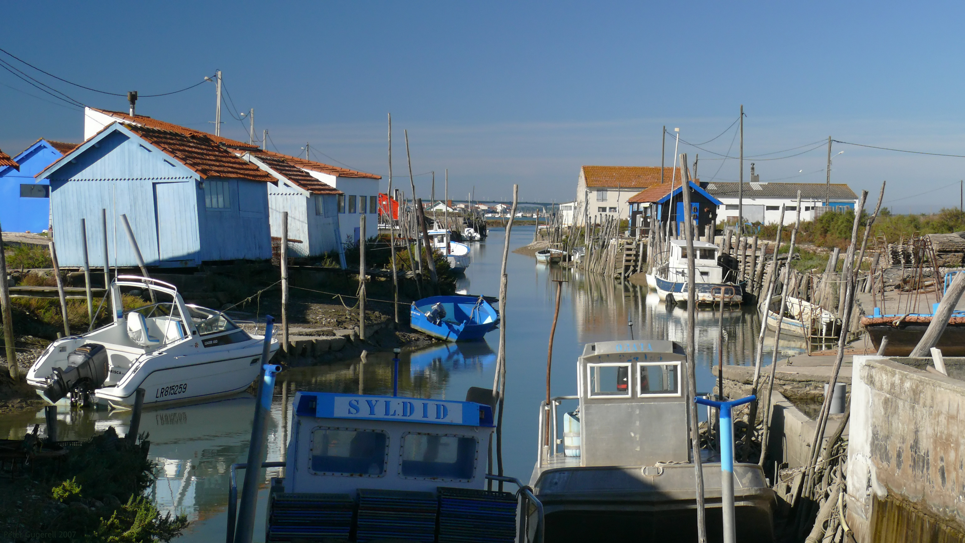 Oyster culture at Île d'Oléron